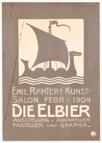 Plakat: Die Elbier - Kunstausstellung in Emil Richters Kunstsalon 1904, Prager Straße, Dresden. Um 1903/1904.